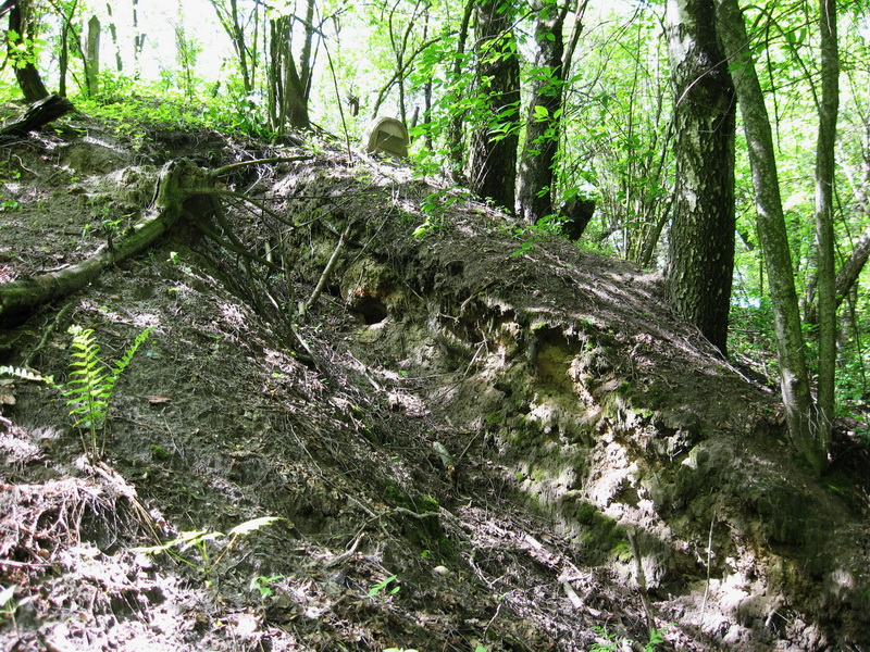 Калодзежны Роў. Агаленне «Прынёманскае 1»